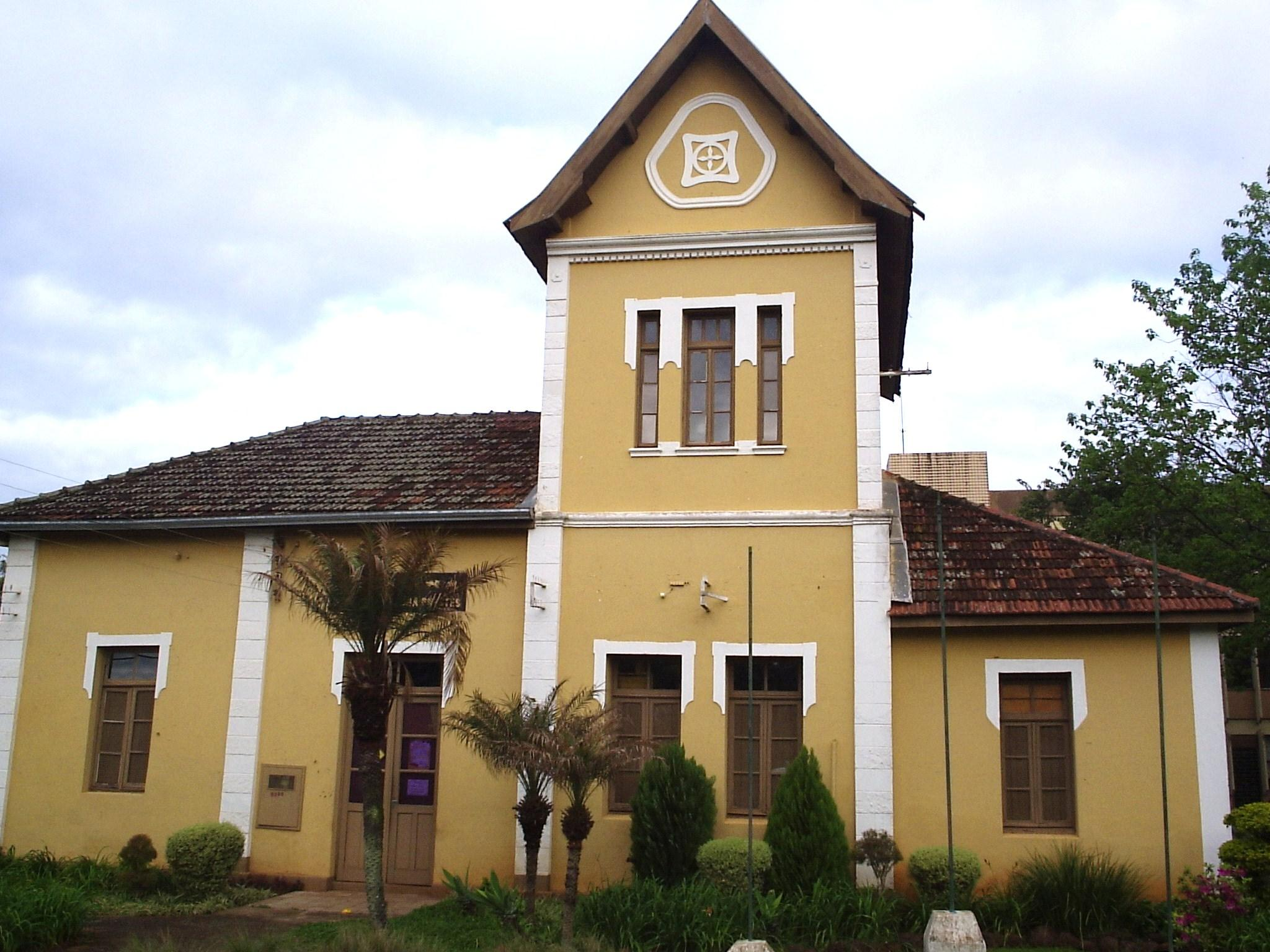 Memorial Coluna Prestes, no local da antiga estação ferroviária de Santo Ângelo, Rio Grande do Sul, Brasil.